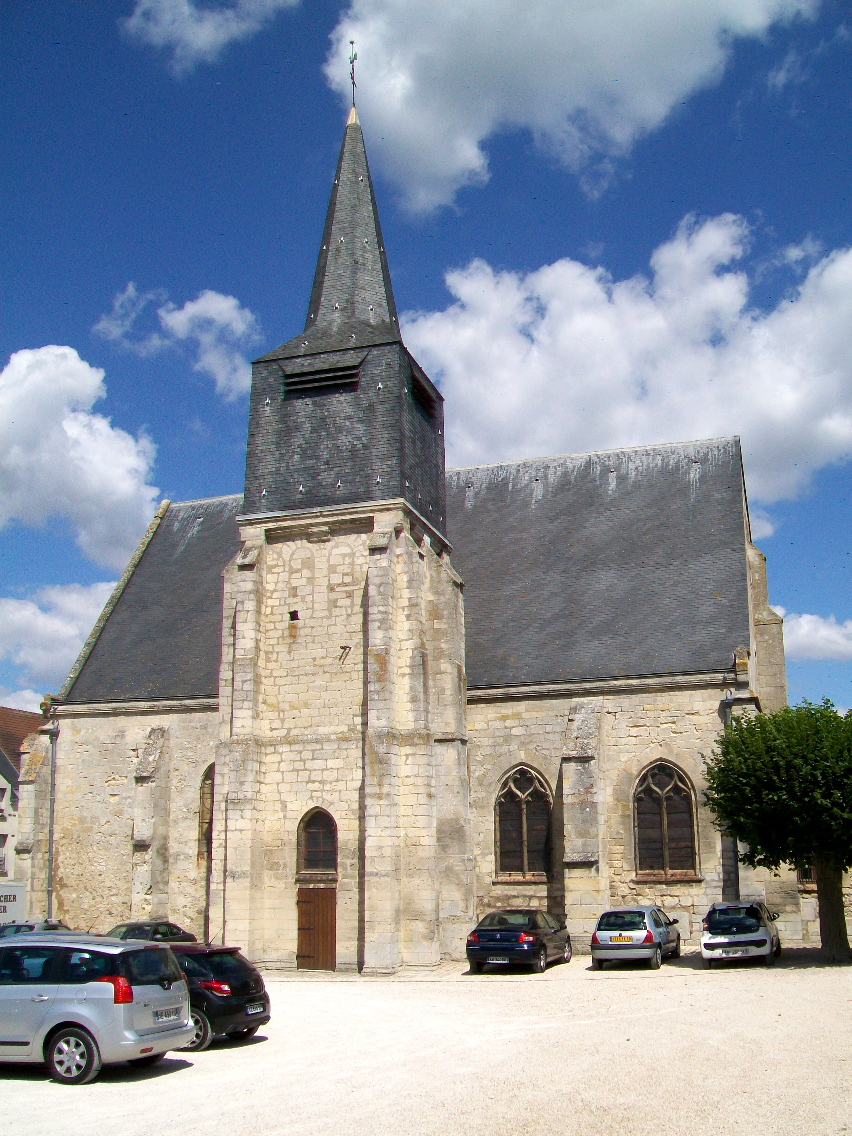 Vue depuis le sud. Le parking correspond à l'emplacement de l'ancien cimetière, jusqu'en 1840.